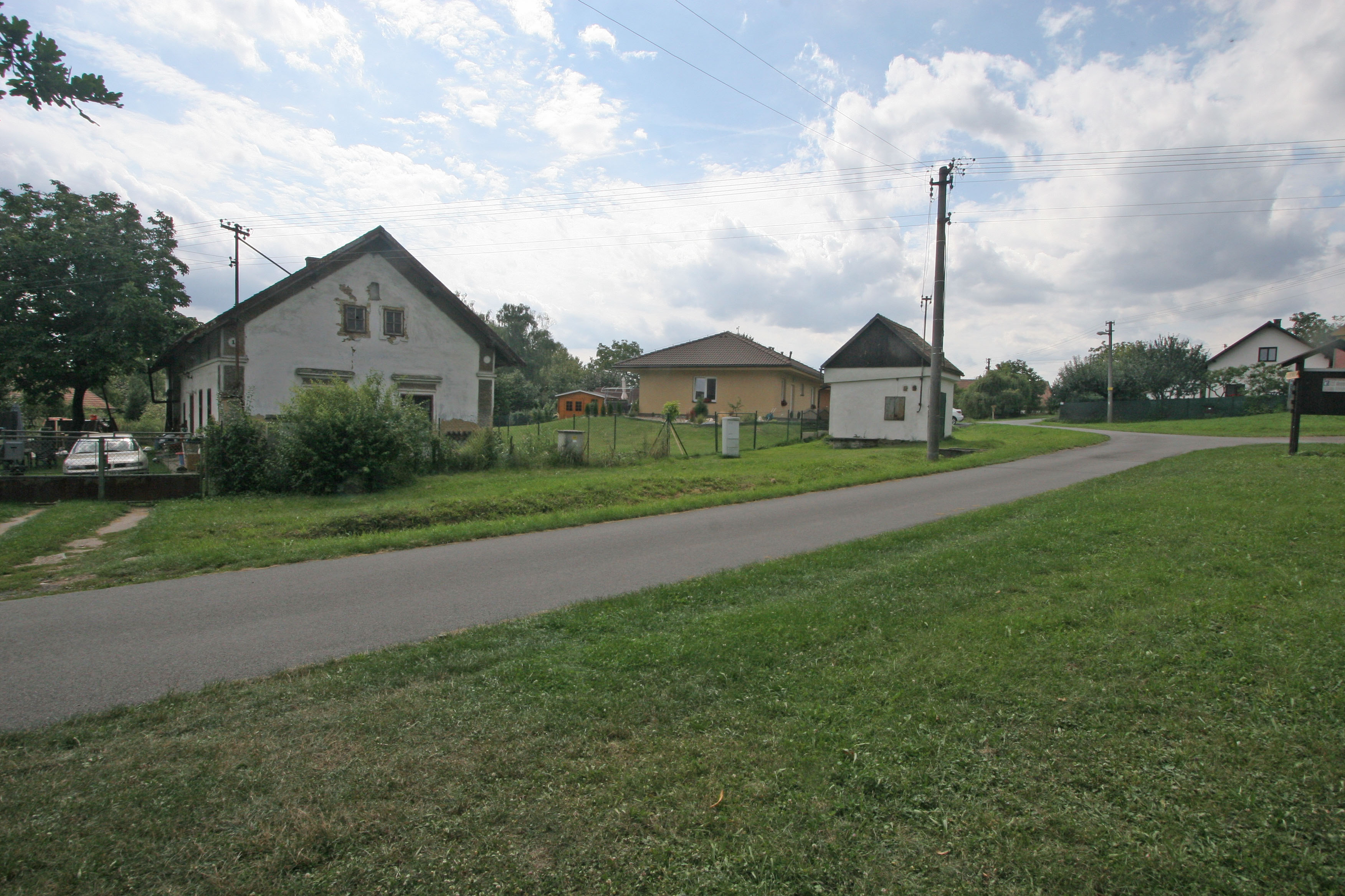 Horní Raškovice čp. 1